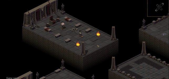 Одне з перших підземель на початку проходження кампанії.